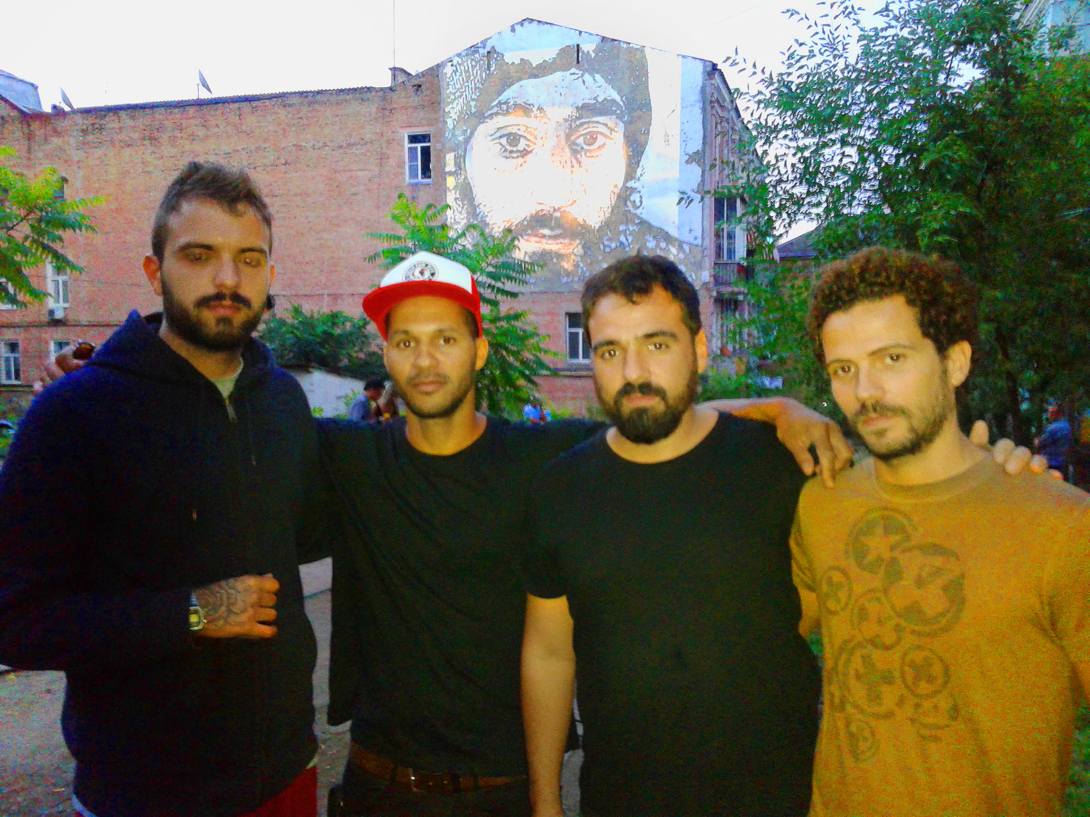 Португальські вуличні художники на чолі з Алешандре Фарту (другий справа) на відкритті скверу Небесної Сотні у Києві 9 липня 2015 року.